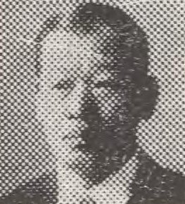 増永元也（1881-1956）